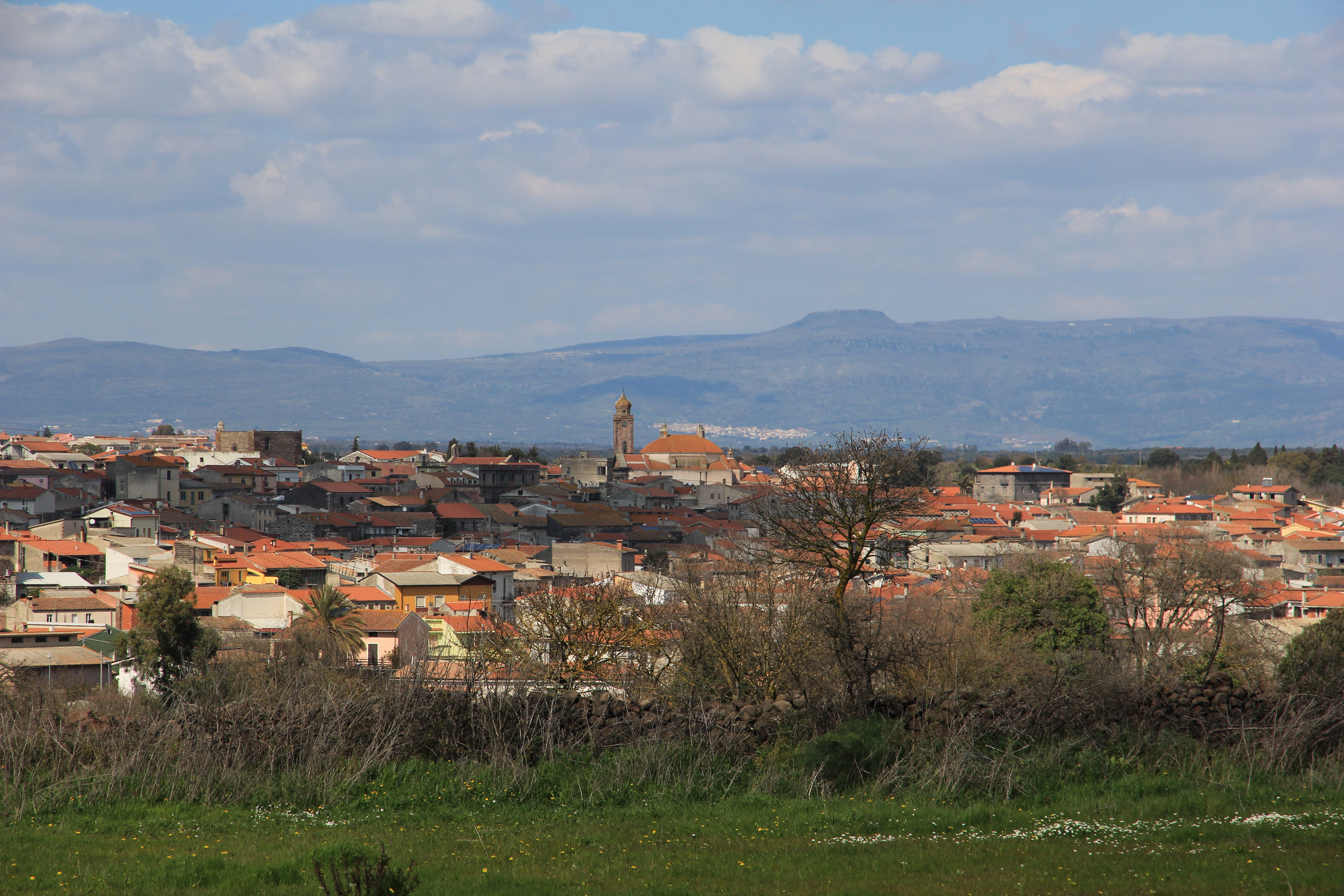 Ghilarza - Panorama